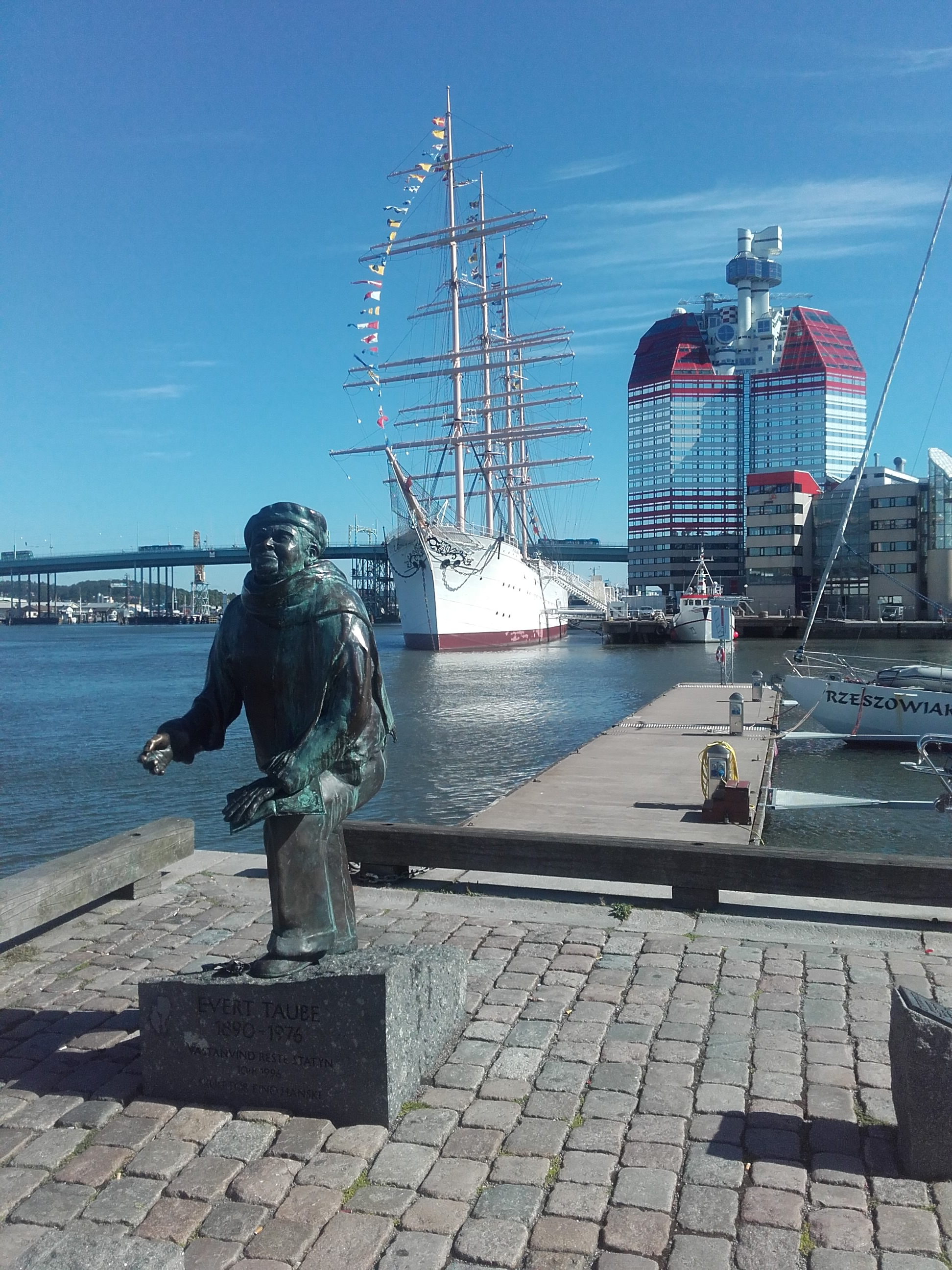 Staty av Evert Taube rest av Västanvind 10 juni 1996 vid Lilla Bommen i Göteborg.